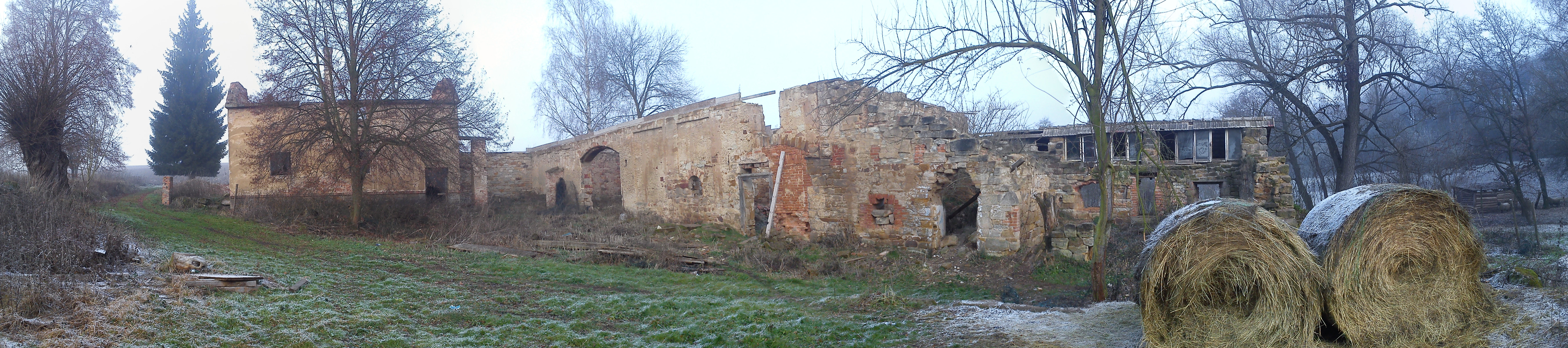 Samota Pacov, rozpadající se domy, které nově přišly o střechy; pohled na sever